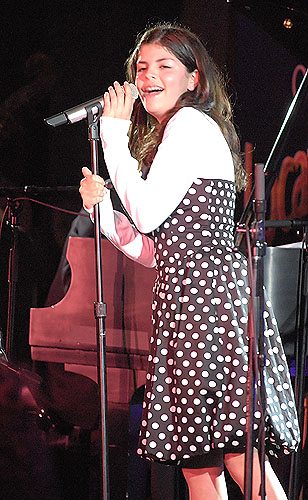 Nikki Yanofsky performing on stage.